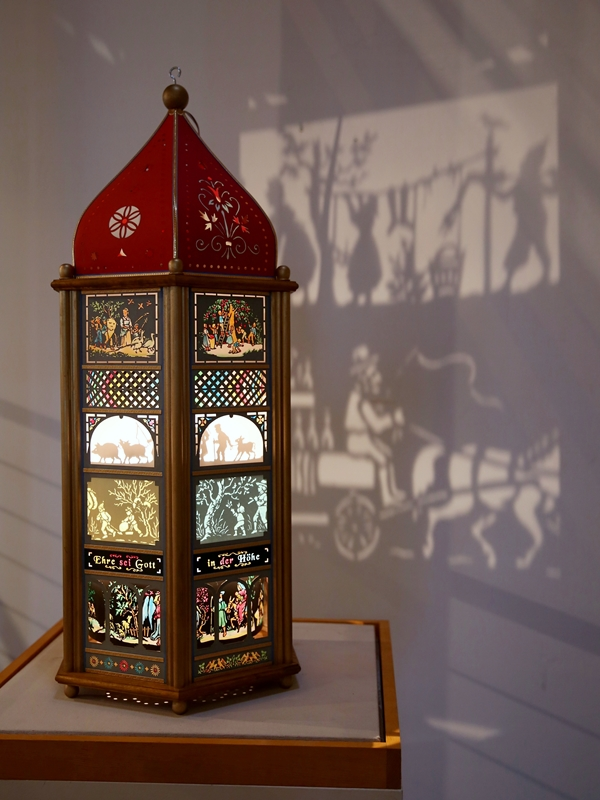 ein sogenanntes Sebnitzer Schattenspiel, eine auf die sächsische Region um Sebnitz begrenzte Form der Weihnachtsvolkskunst.